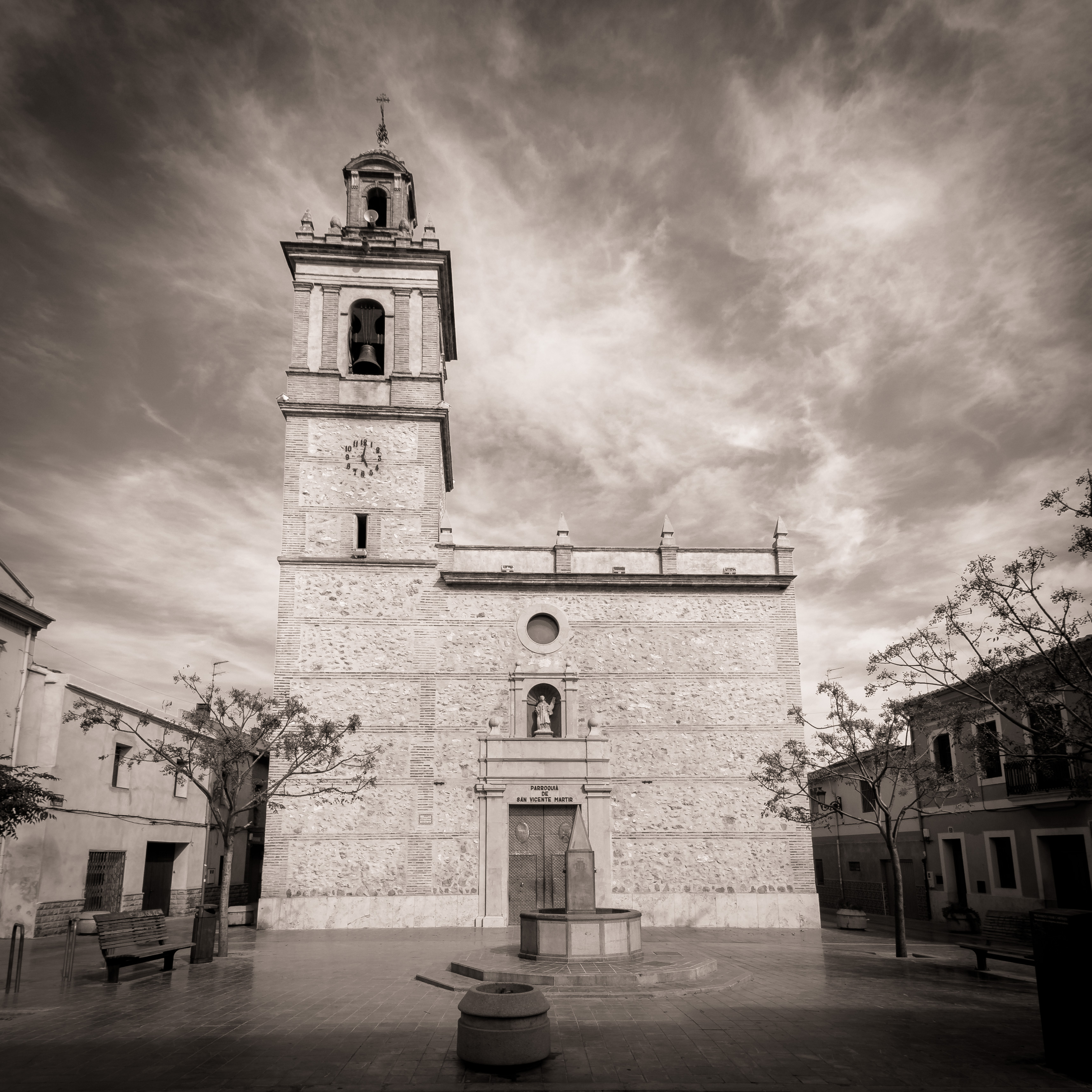 Iglesia Parroquial San Vicente Mártir de Benimámet 15.250-275.